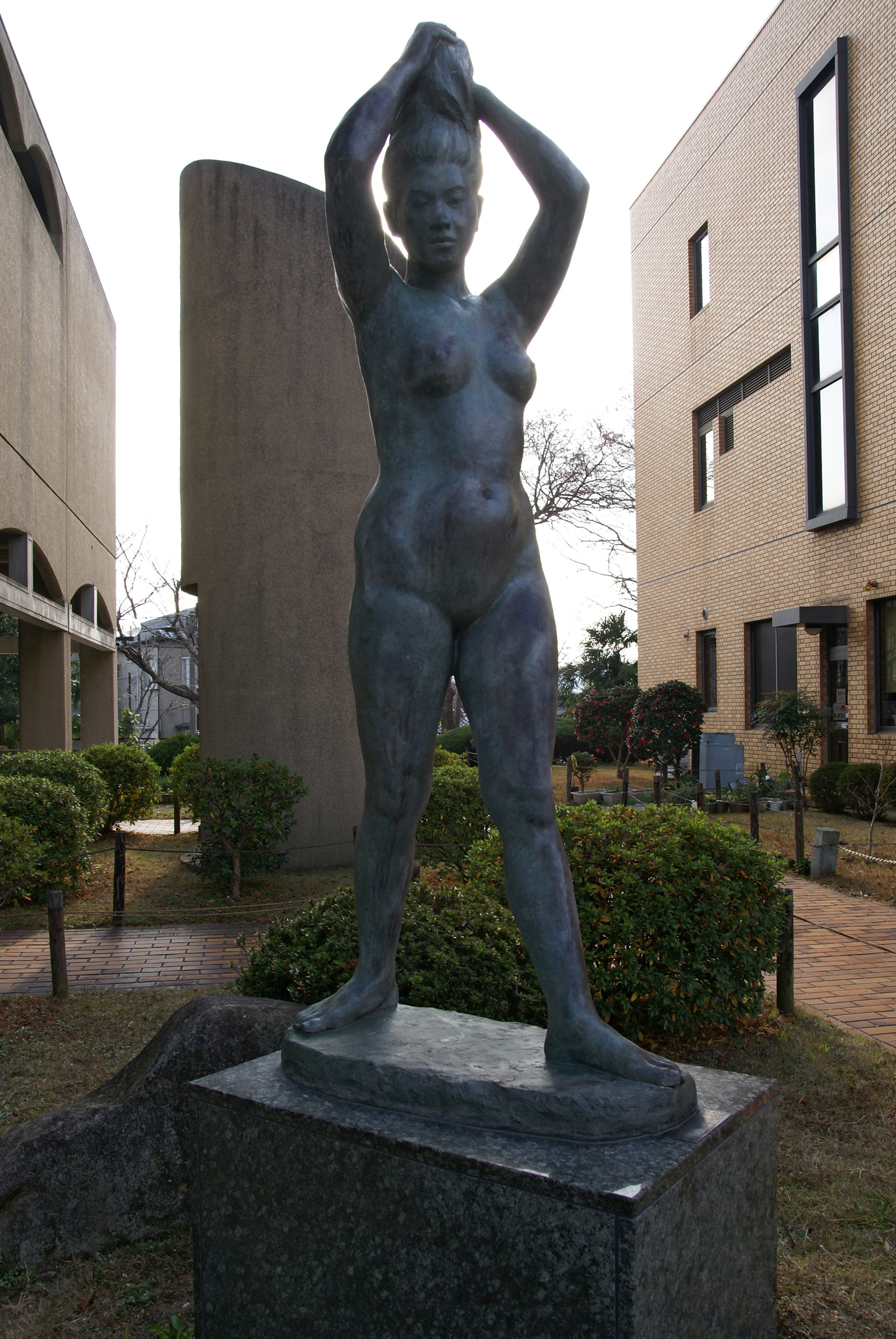 Miki Municipal Horimitsu Museum in Miki, Hyogo prefecture, Japan